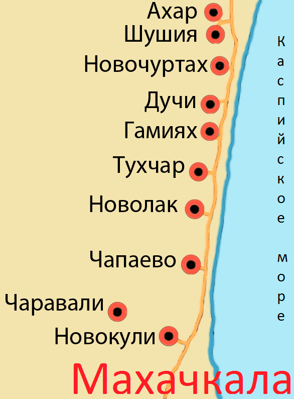 Карта Новостроя (Дагестан)